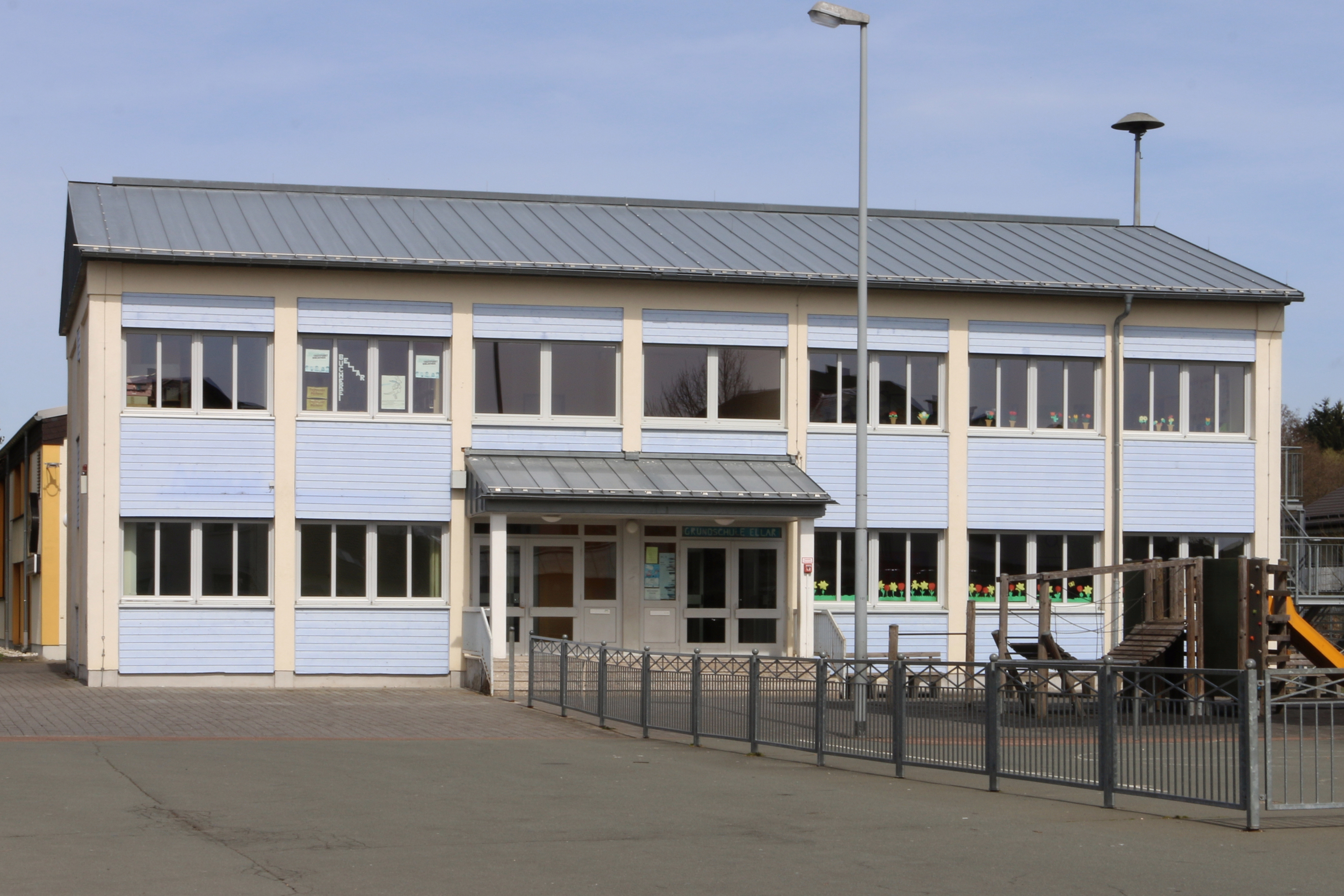 Waldbrunn (Westerwald) Ellar, Landkreis Limburg-Weilburg: Grundschule in den 1970er als Rathaus erbaut